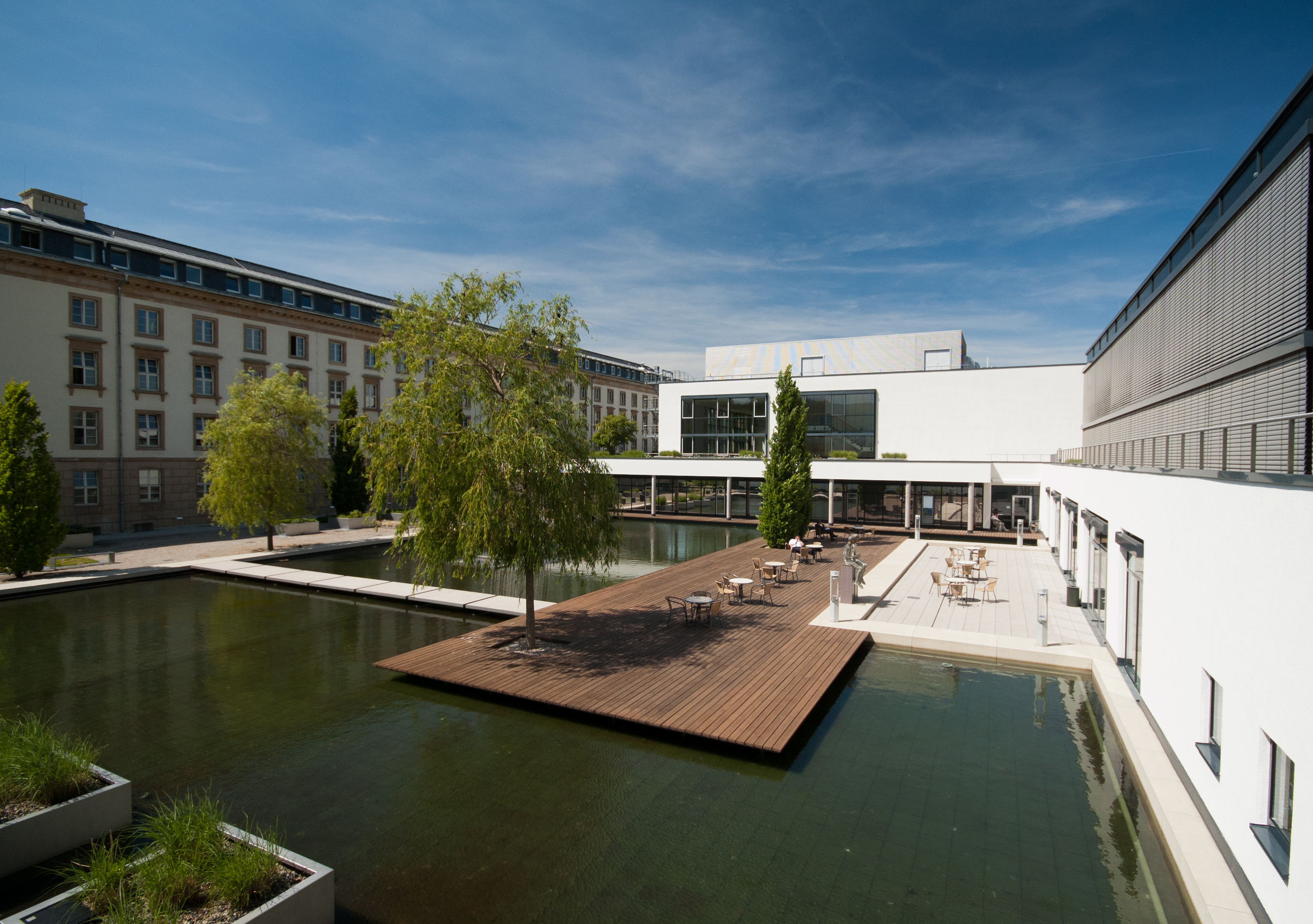 Landtagsgebäude des thüringischen Landtages in Erfurt: Sonnenterrasse zwischen Funktionsgebäude und Abgeordnetenhaus Die Aufnahme ist während des Landtagsprojektes Erfurt vom 18.–19. Mai 2011 entstanden.